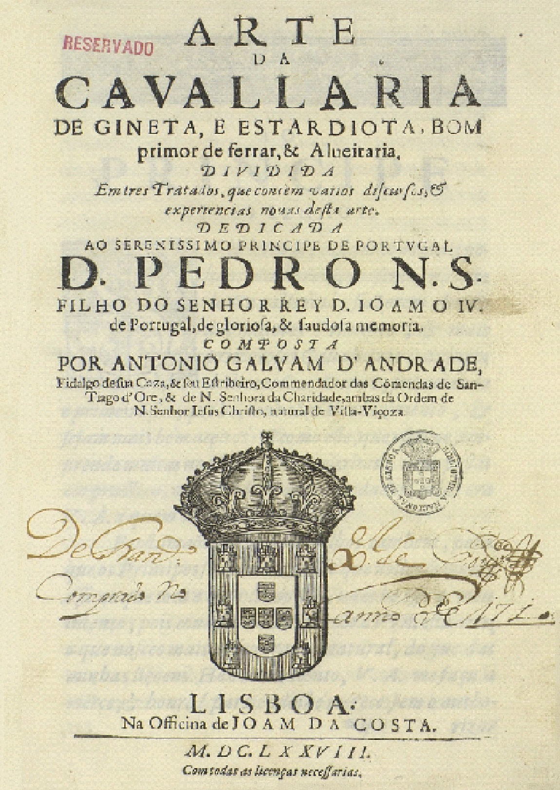 Frontispício da "Arte da Cavallaria de Gineta, e Estardiota, Bom Primor de Ferrar, e Alveitaria de António Galvão de Andrade. (Lisboa: Officina de Joam da Costa, 1678). O primeiro tratado de toureio de Portugal. ”Estardiota: processo de cavalgar, estendendo bem as pernas, processo contrário ao de ginêta”, in CÂNDIDO DE FIGUEIREDO: Nôvo Diccionário da Língua Portuguesa (1899), Vol. I, p. 564